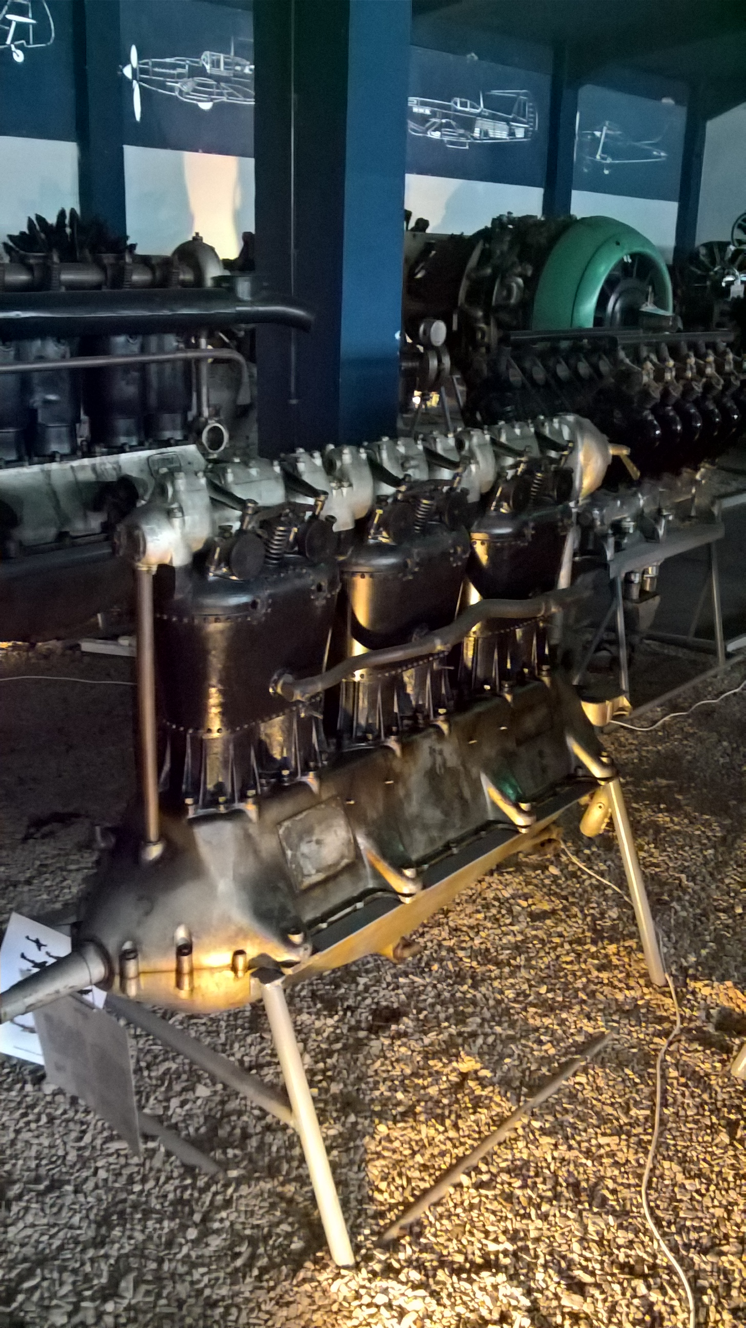 Włoski 6-cylindrowy silnik rzędowy SPA 6 z 1916 r. eksponowany w Muzeum Lotnictwa Polskiego w Krakowie.